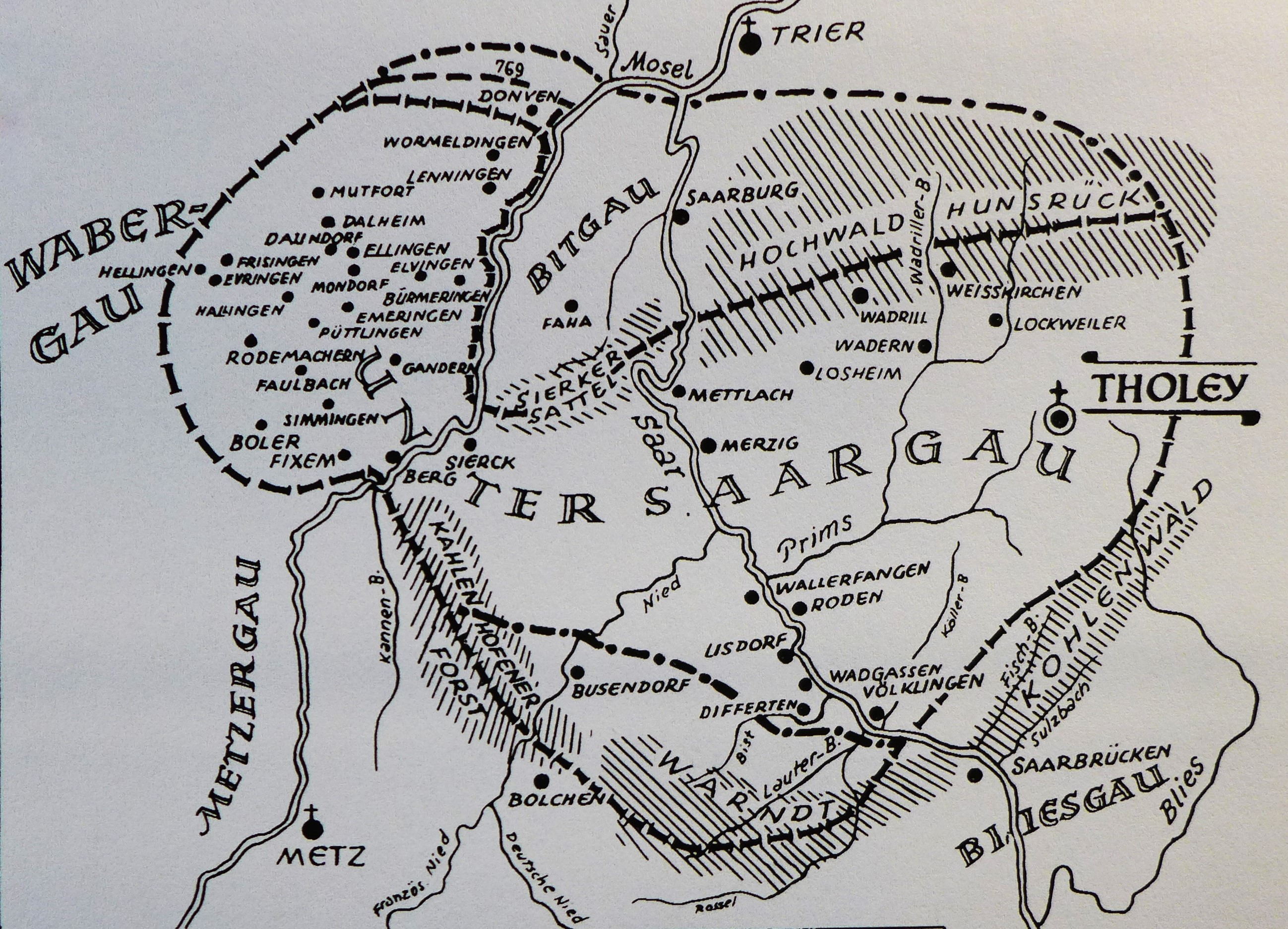 Archidiakonat Tholey; Die gestrichelte Linie gibt die ungefähren Grenzen des Untersaargaues an; Die strichpunktierte Linie gibt die Grenzen des Archidiakonates Tholey an, soweit sie von den Grenzen des Untersaargaues abweichen; Grafik von Hans Nicola und Andreas Mailänder (in: Über 1000 Jahre Wallerfangen, hrsg. Amtsverwaltung Wallerfangen, Saarlouis 1962)